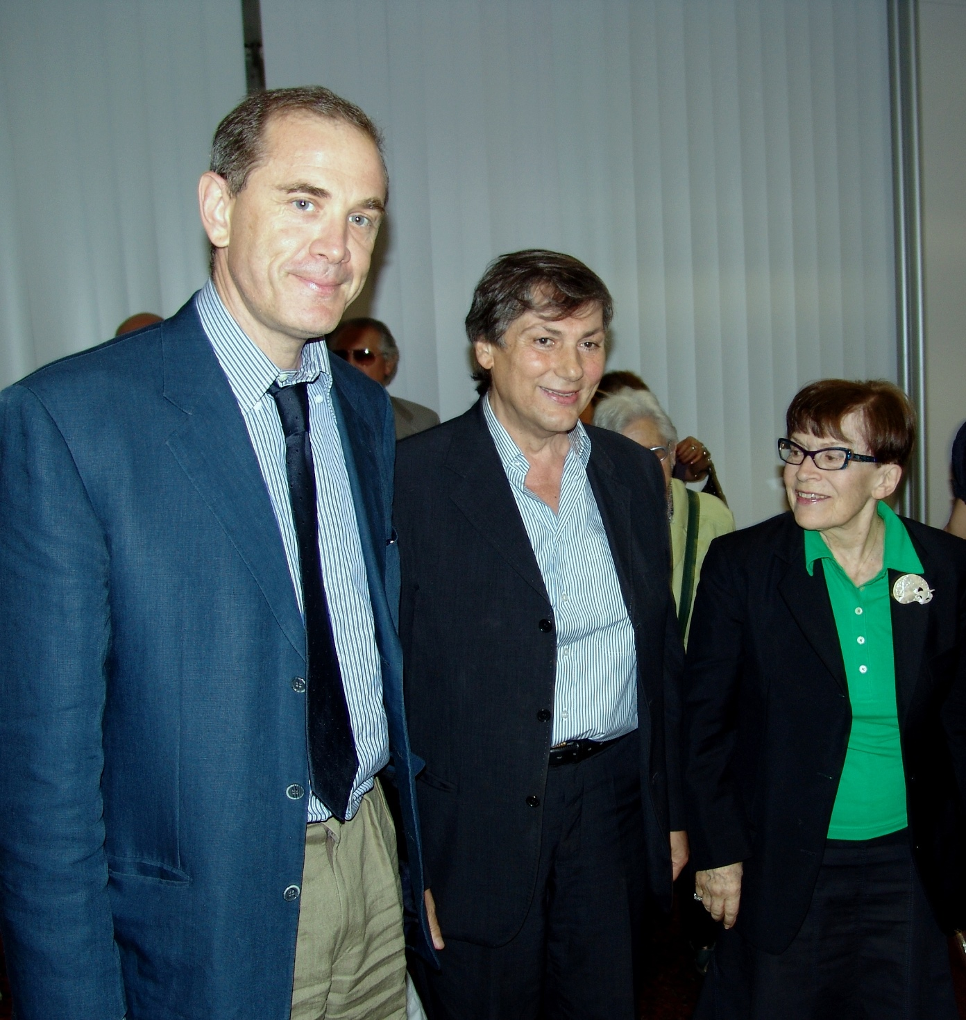 Italo Benedetti, presentazione del libro "Gli aironi di Sabaudia" alla Biblioteca Nazionale con Urbano Barberini, Franca Valeri